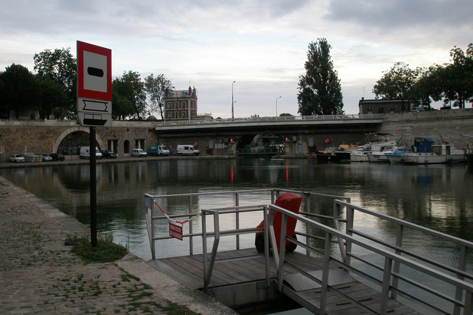 Port de l'Arsenal.